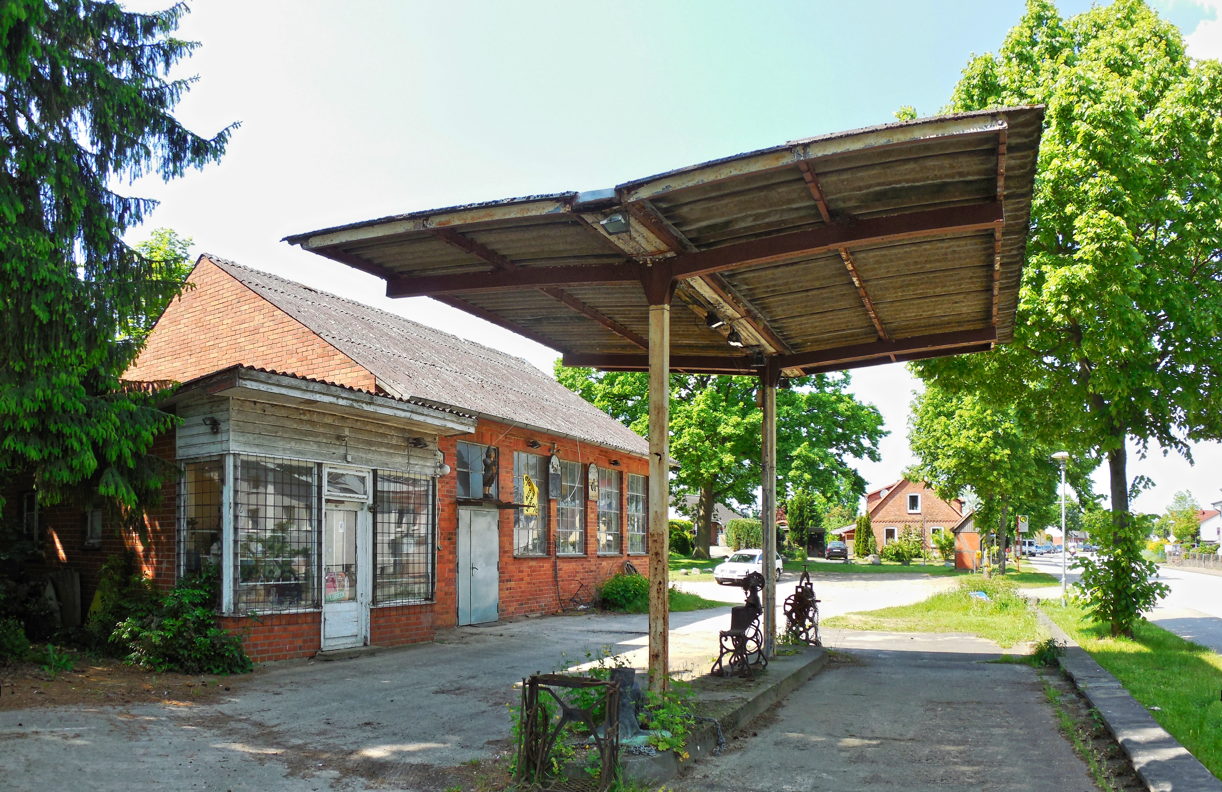 23911 Pogeez, Germany